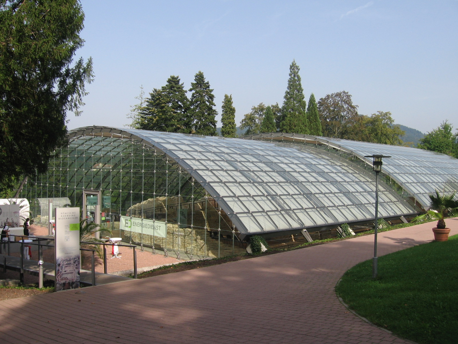 Römische Badruine, Eingang und Schutzdach, Roadytom, selbstfotografiert